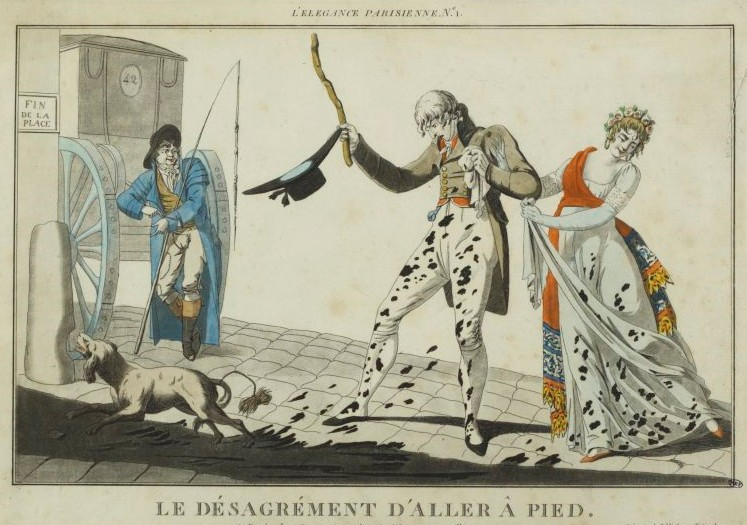 Caricature : Le désagrément d'aller à pied , Musée de la Révolution française - Vizille